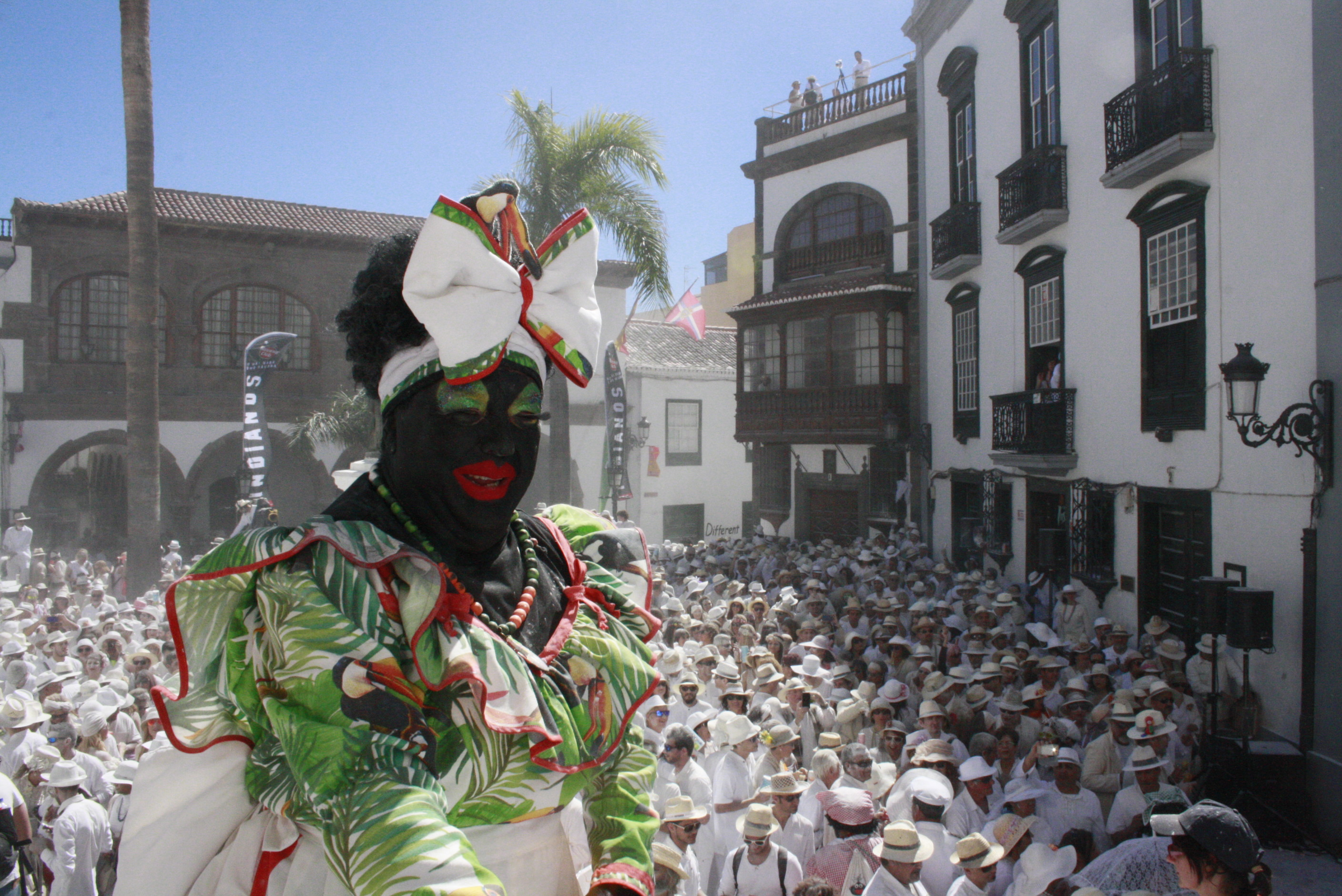 La Negra Tomasa es uno de los protagonistas de Los Indianos